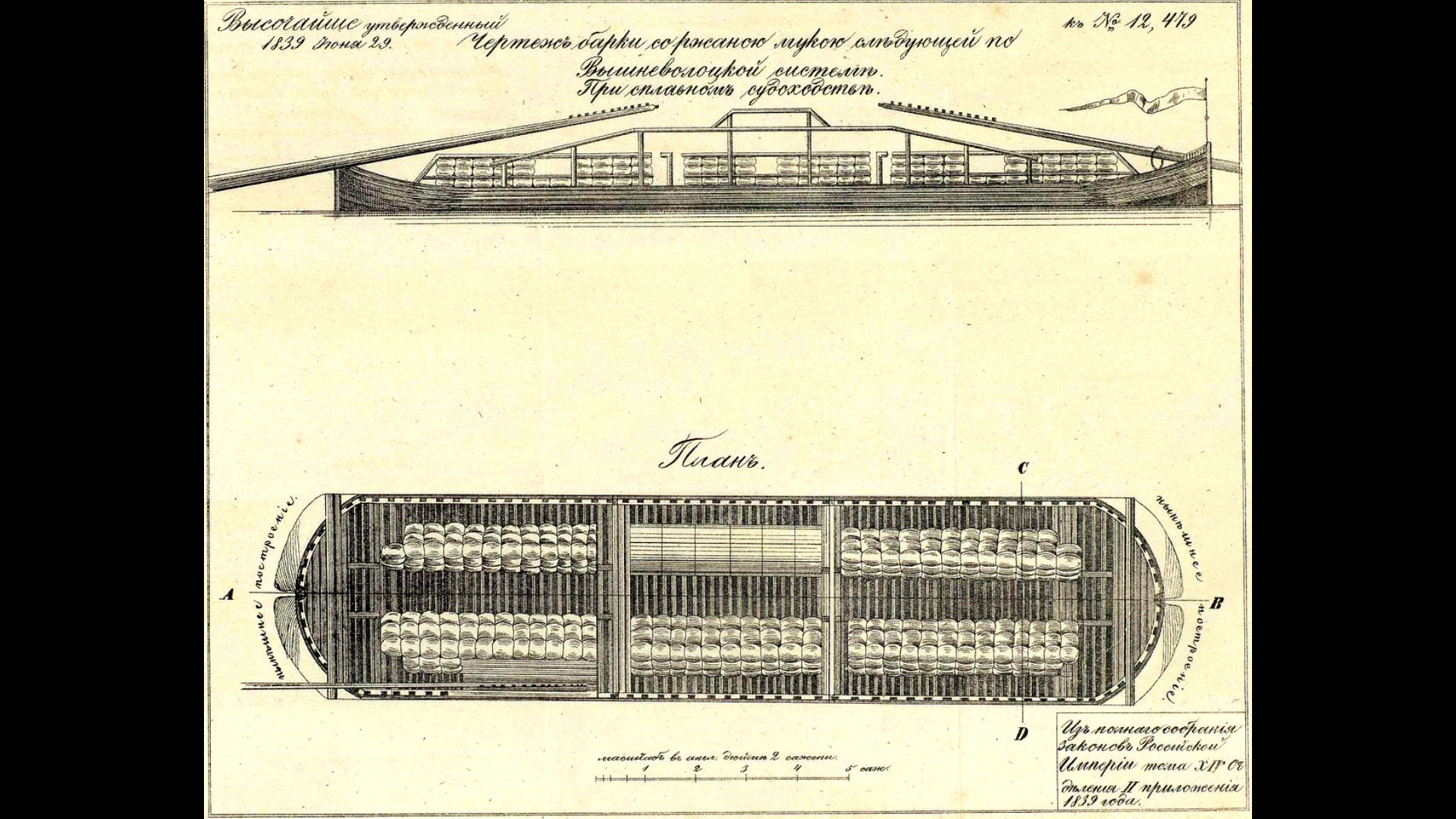 Барка типовая, проходившая по Боровичским Порогам